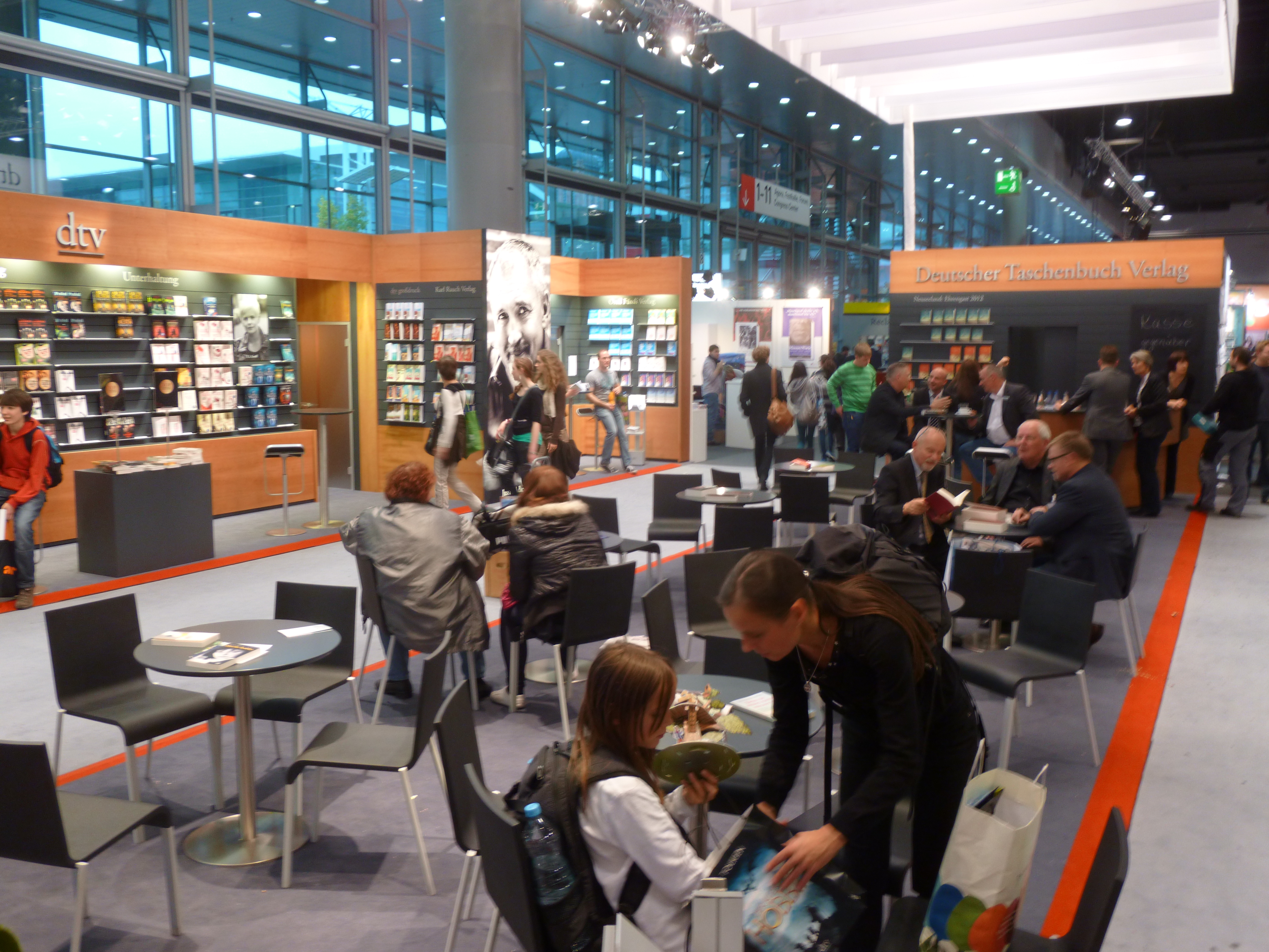 stando de la eldonejo dtv en la Frankfurta librofoiro 2012